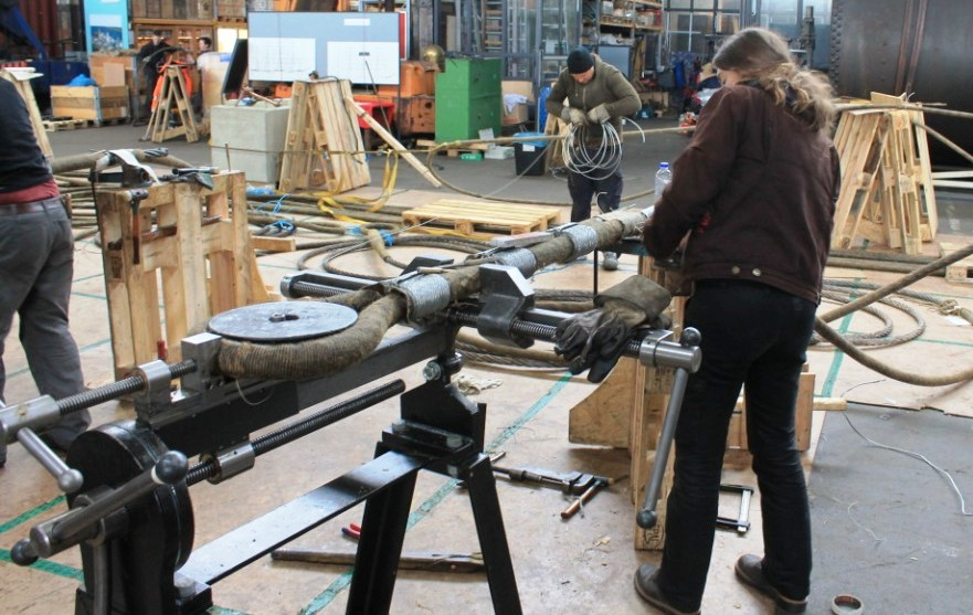 Takelarbeiten